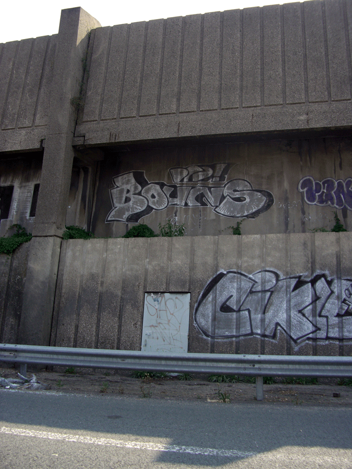 Mur anti-bruit près de Rungis, France